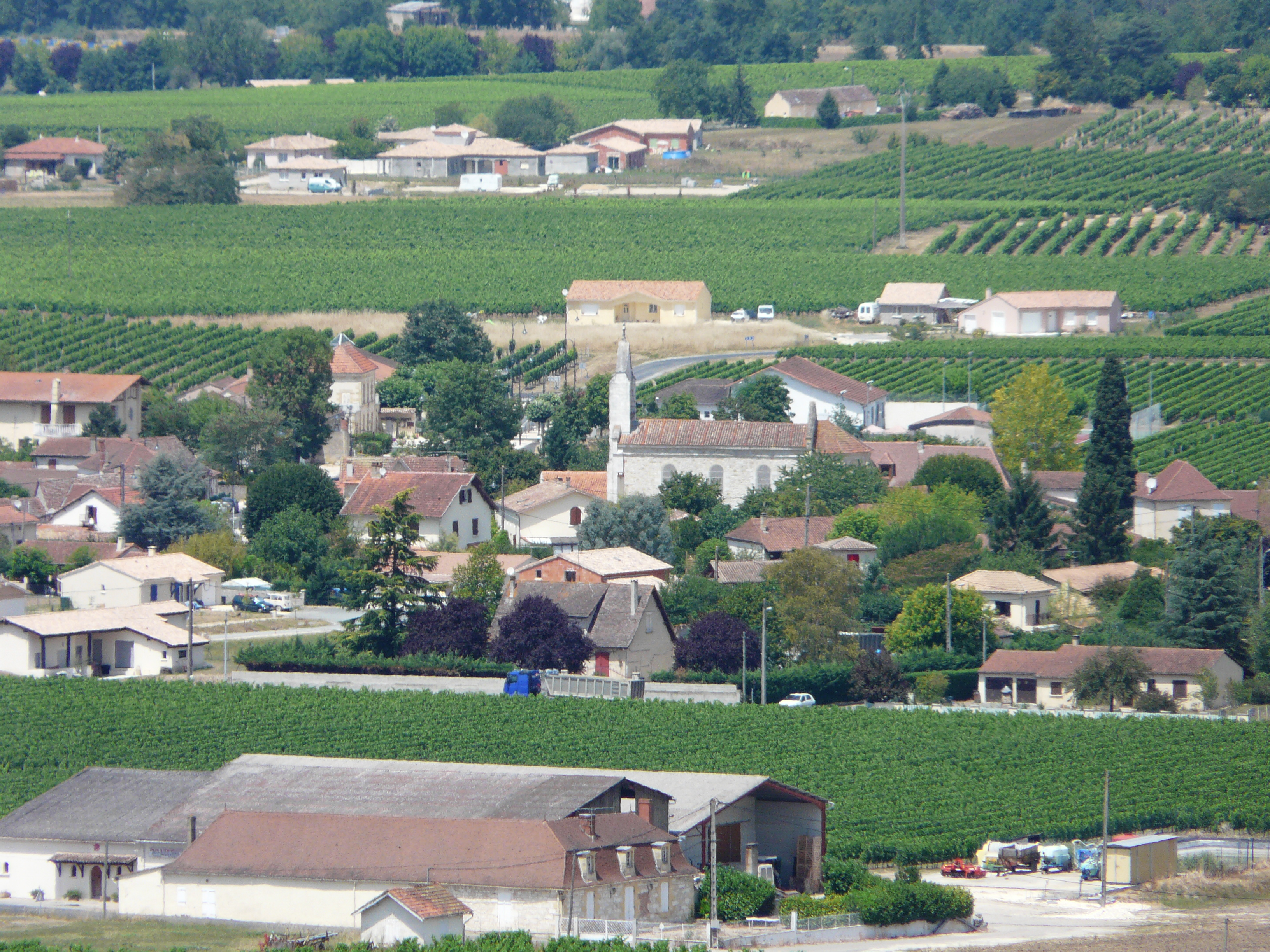 Le village de Saint-Laurent-des-Vignes, Dordogne, France. Vue prise depuis la route départementale 17.